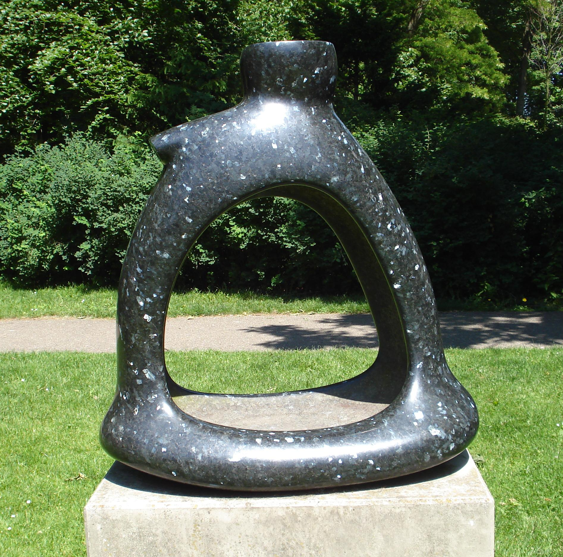 Voorburg, Park Arentsburgh. Kunstwerk "Klankbeeld: herinnering aan Effatha" van Immanuel Klein. The Netherlands. FOP.